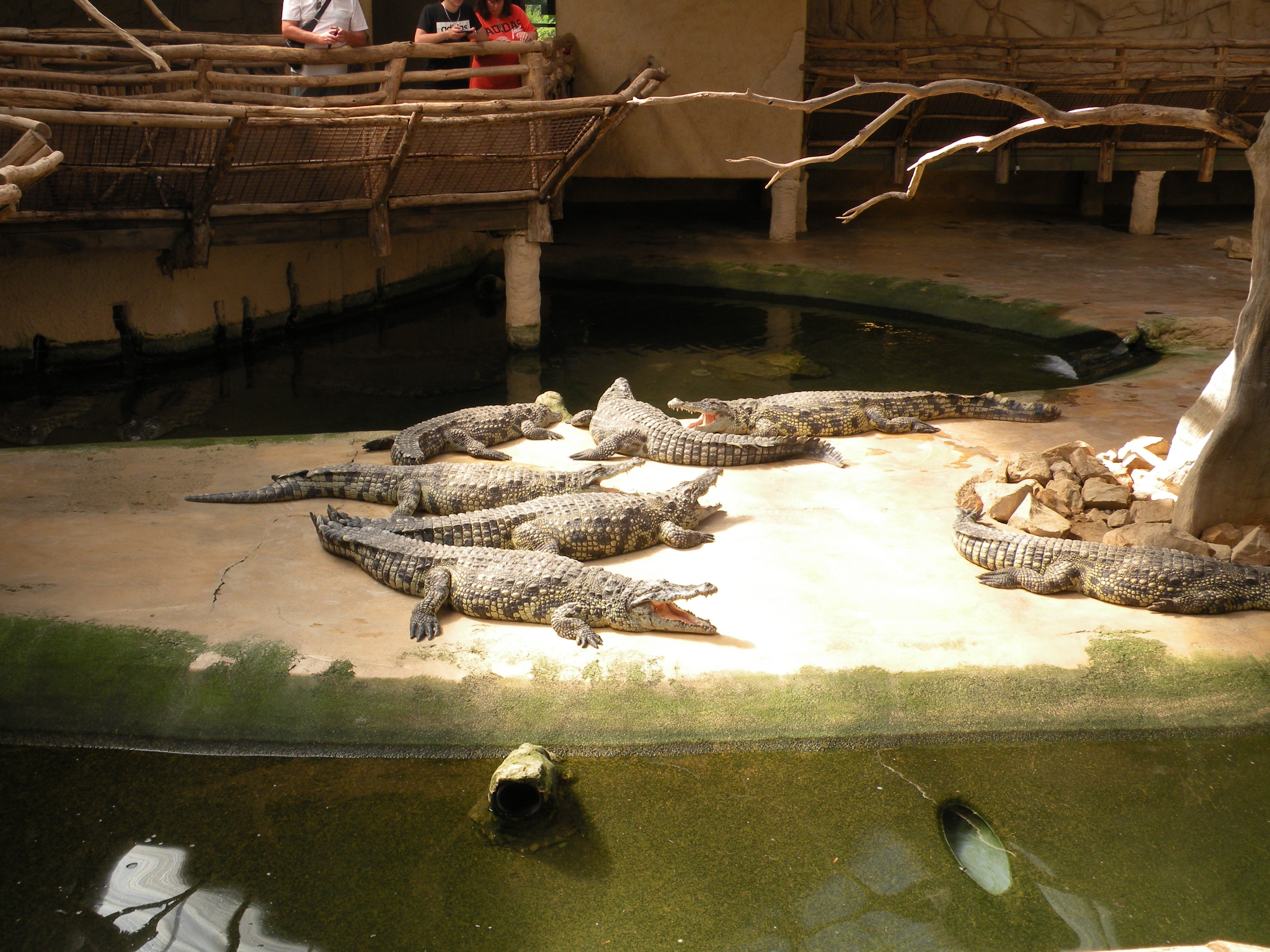 Alligator Bay de Beauvoir (Manche)